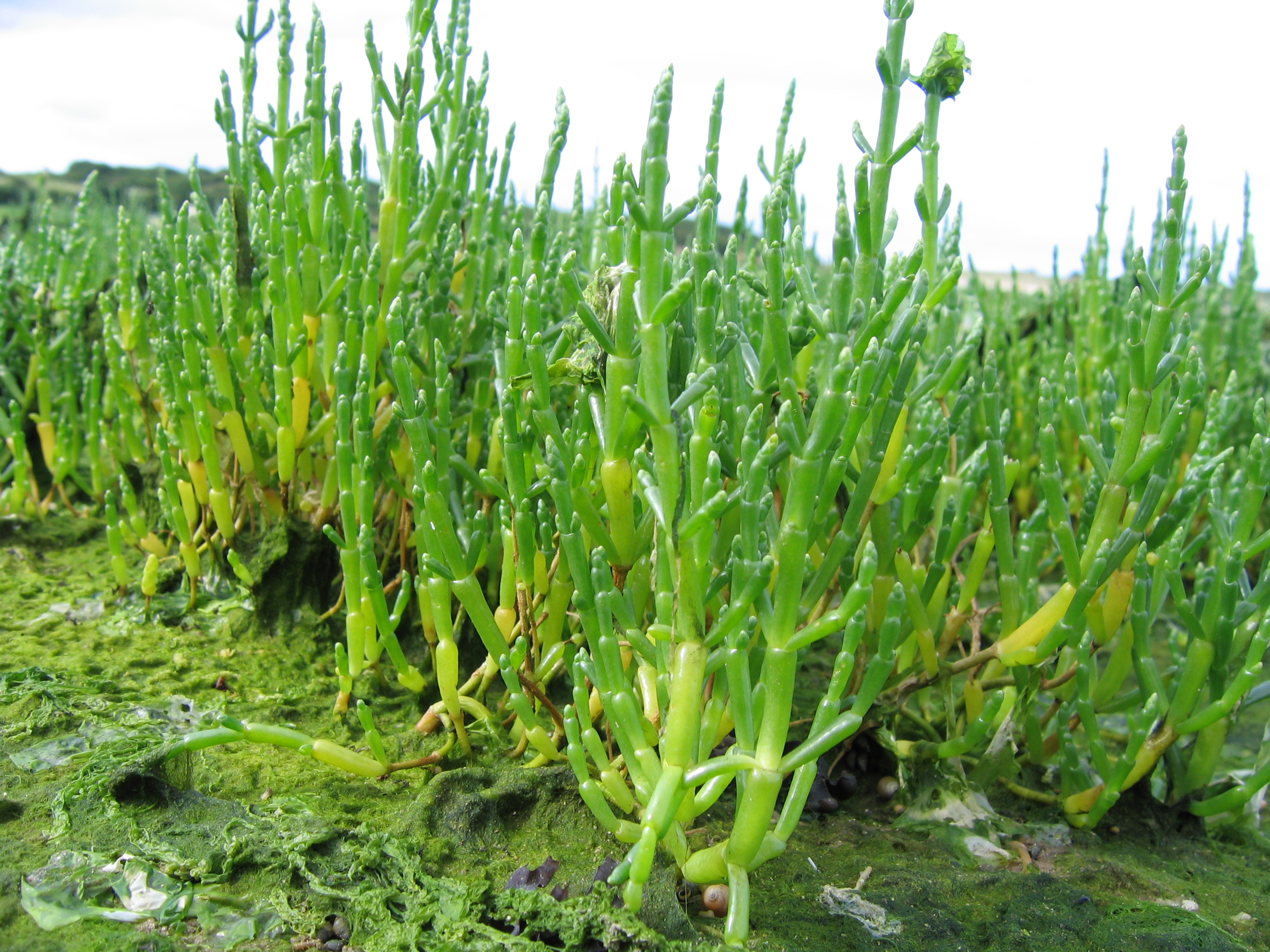 Salicorne nord Finistère France